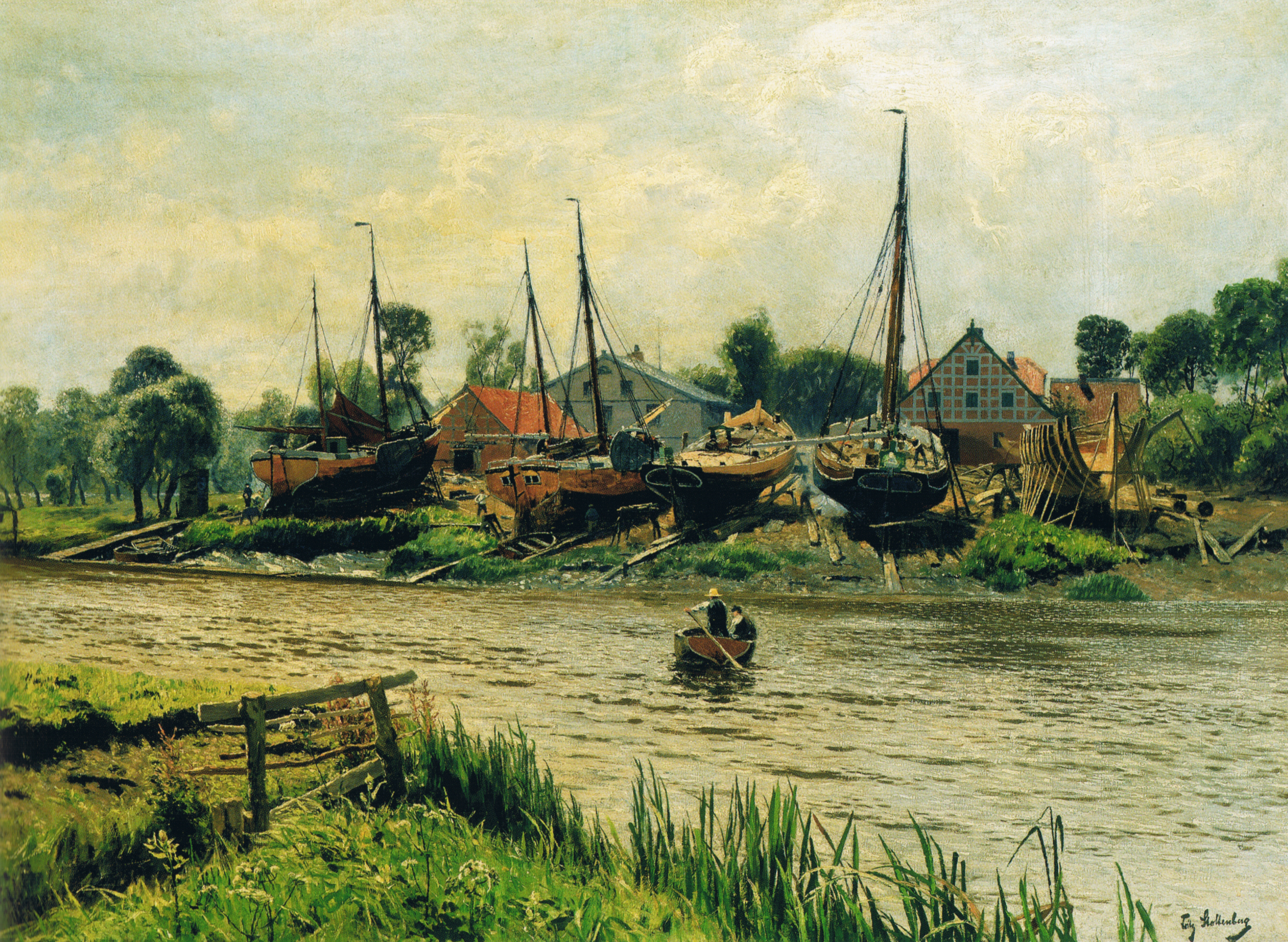 Holzschiffswerft in Schleswig-Holstein, Gemälde von Fritz Stoltenberg